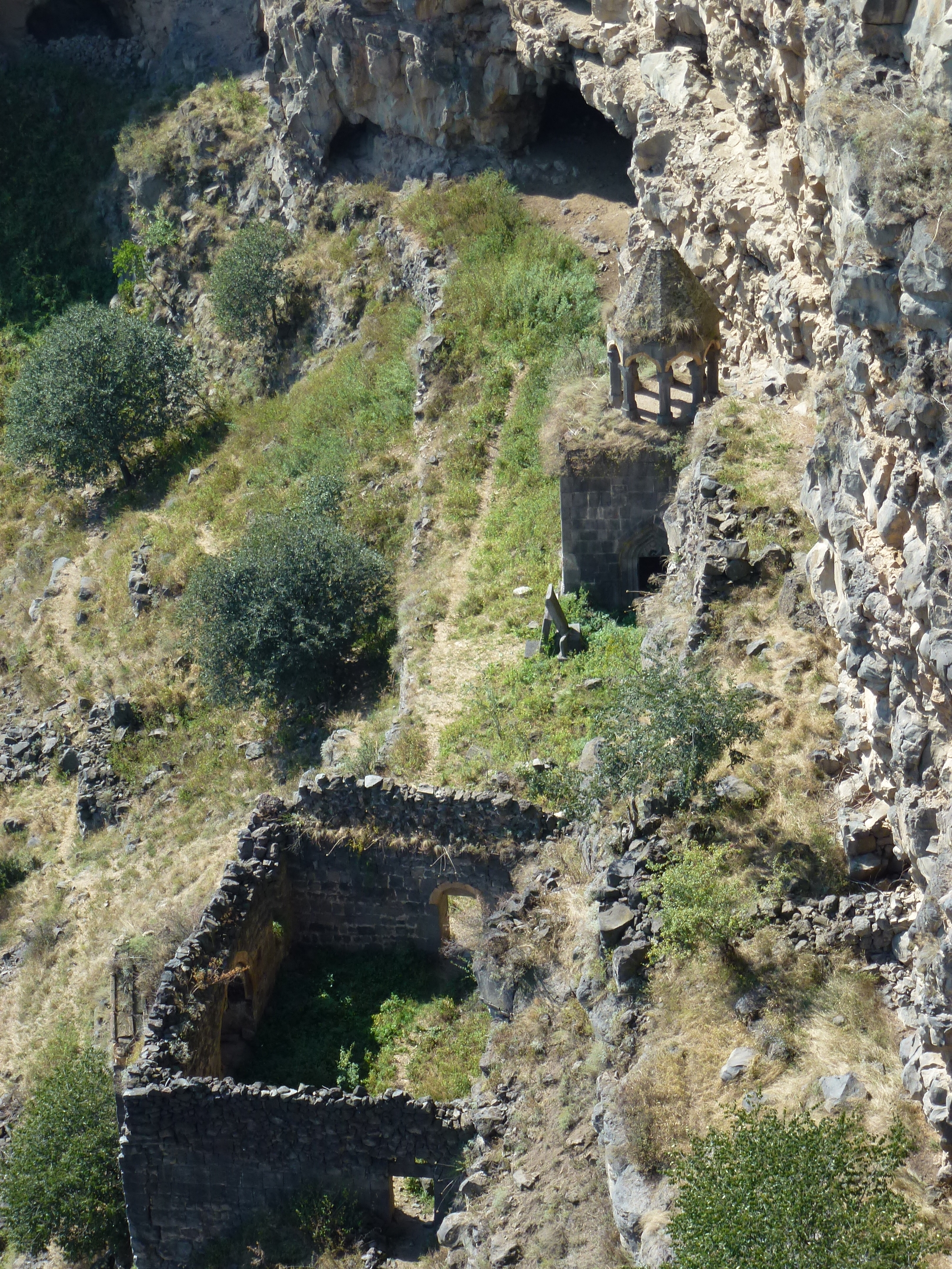 Հոռոմայրի Սուրբ Նշան եկեղեցի, Վերին 112/11